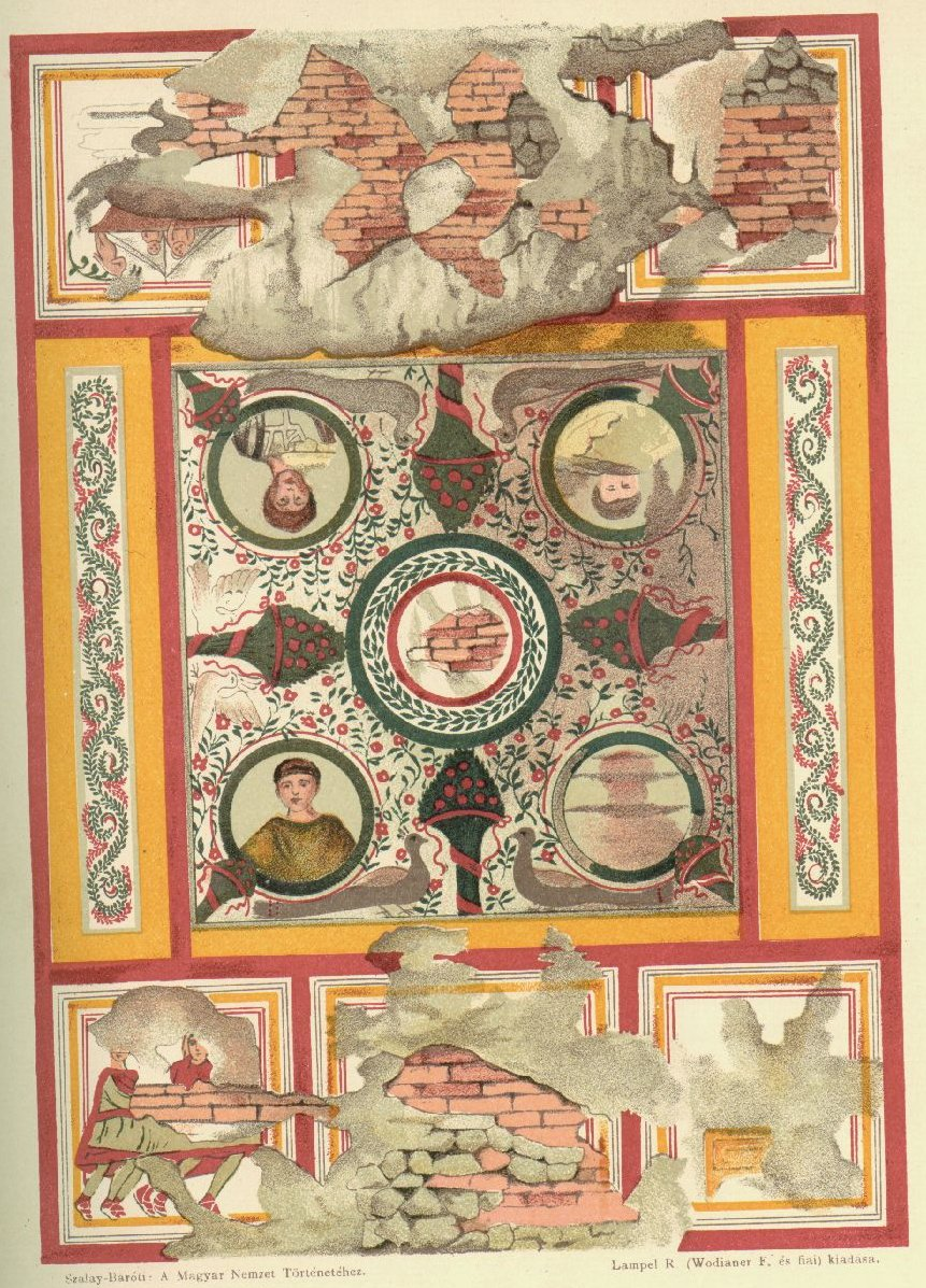 fájlcímet lásd.